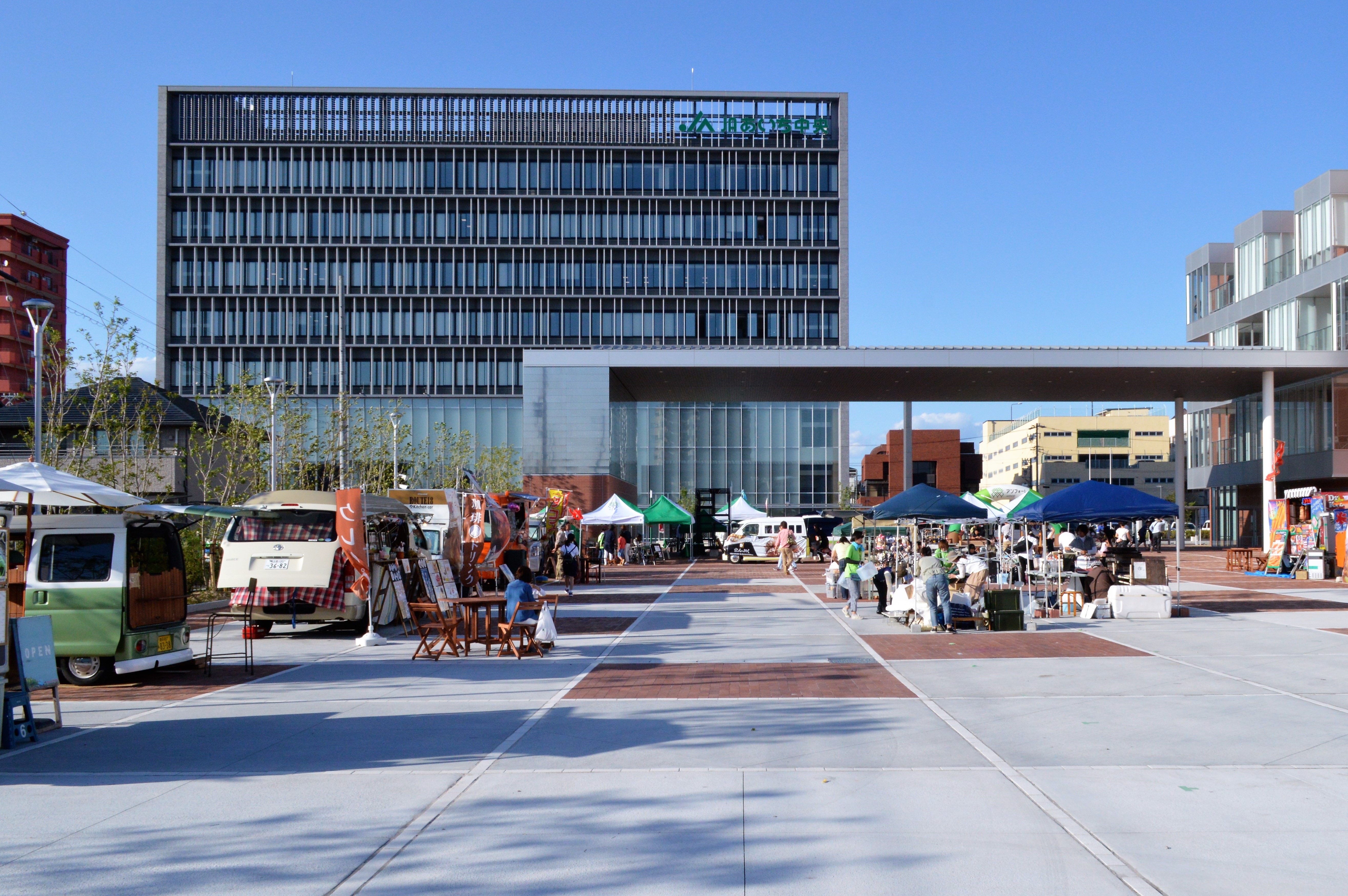 アンフォーレの「願いごと広場」。右奥は安城市図書情報館が入っている本館。奥はあいち中央農業協同組合（JAあいち中央）本店。。